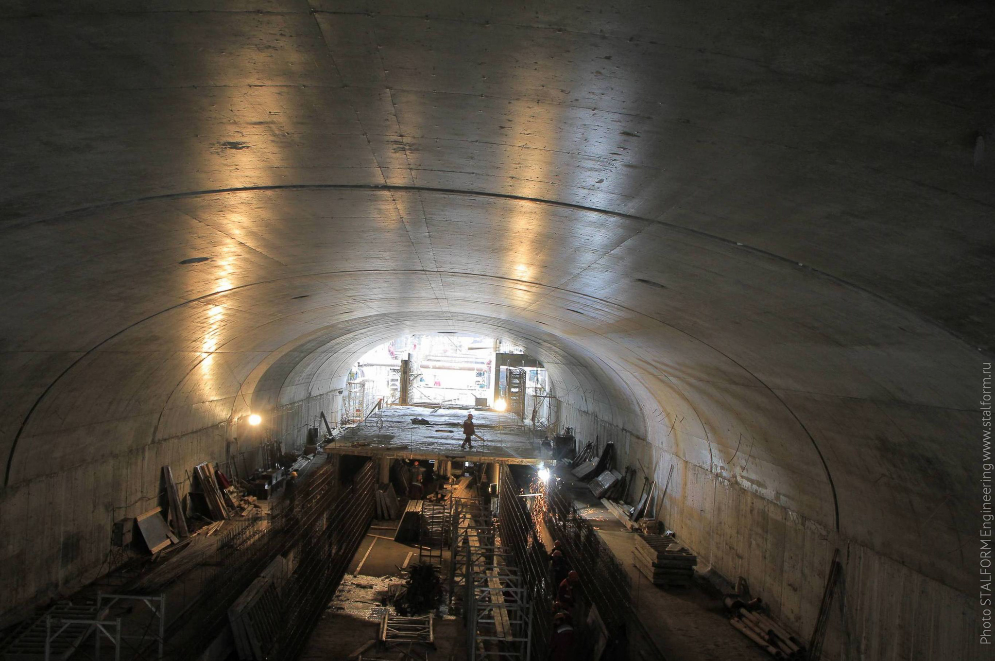 Бетонирование станции метро Алма-Атинская завершено.